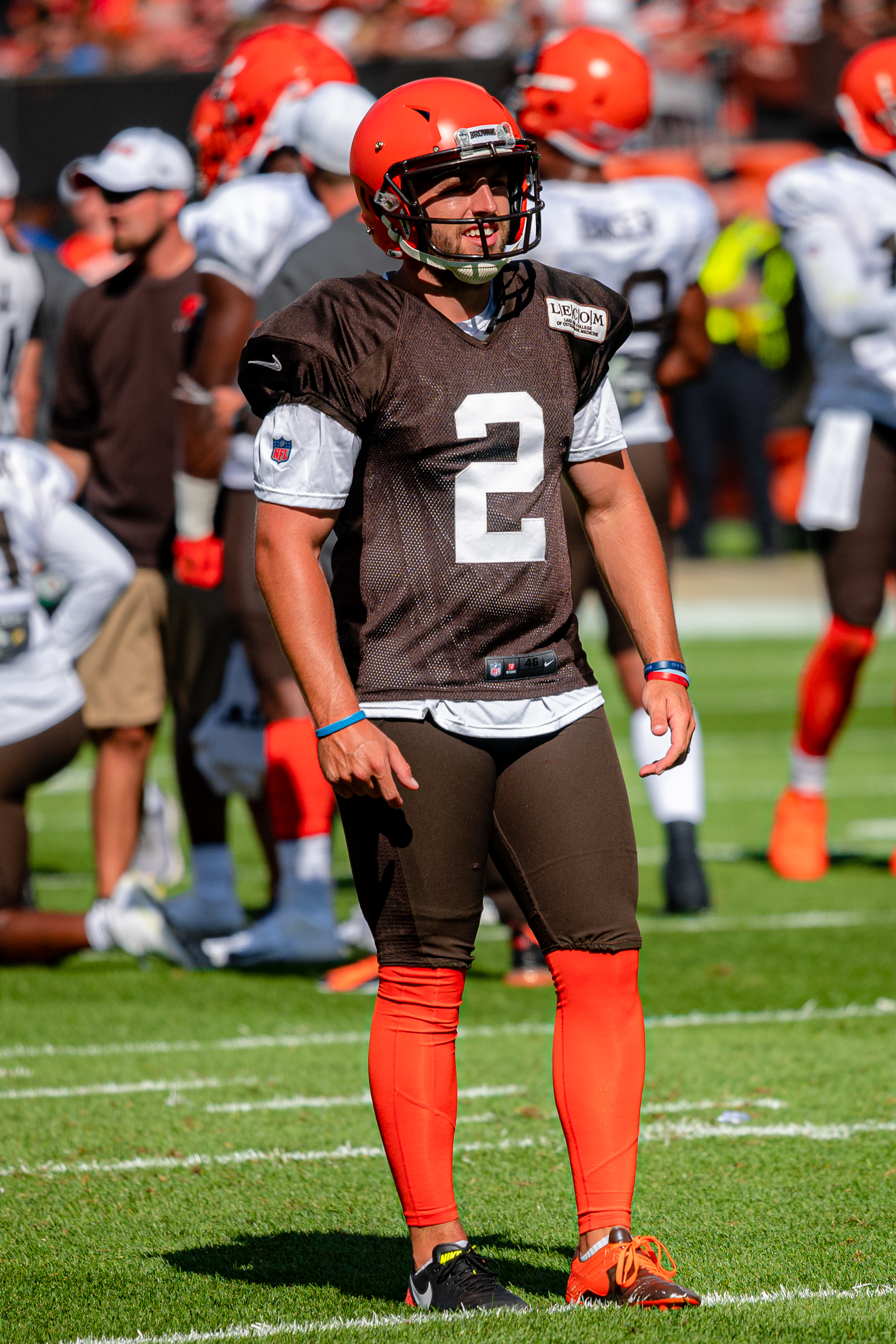 Austin Seibert